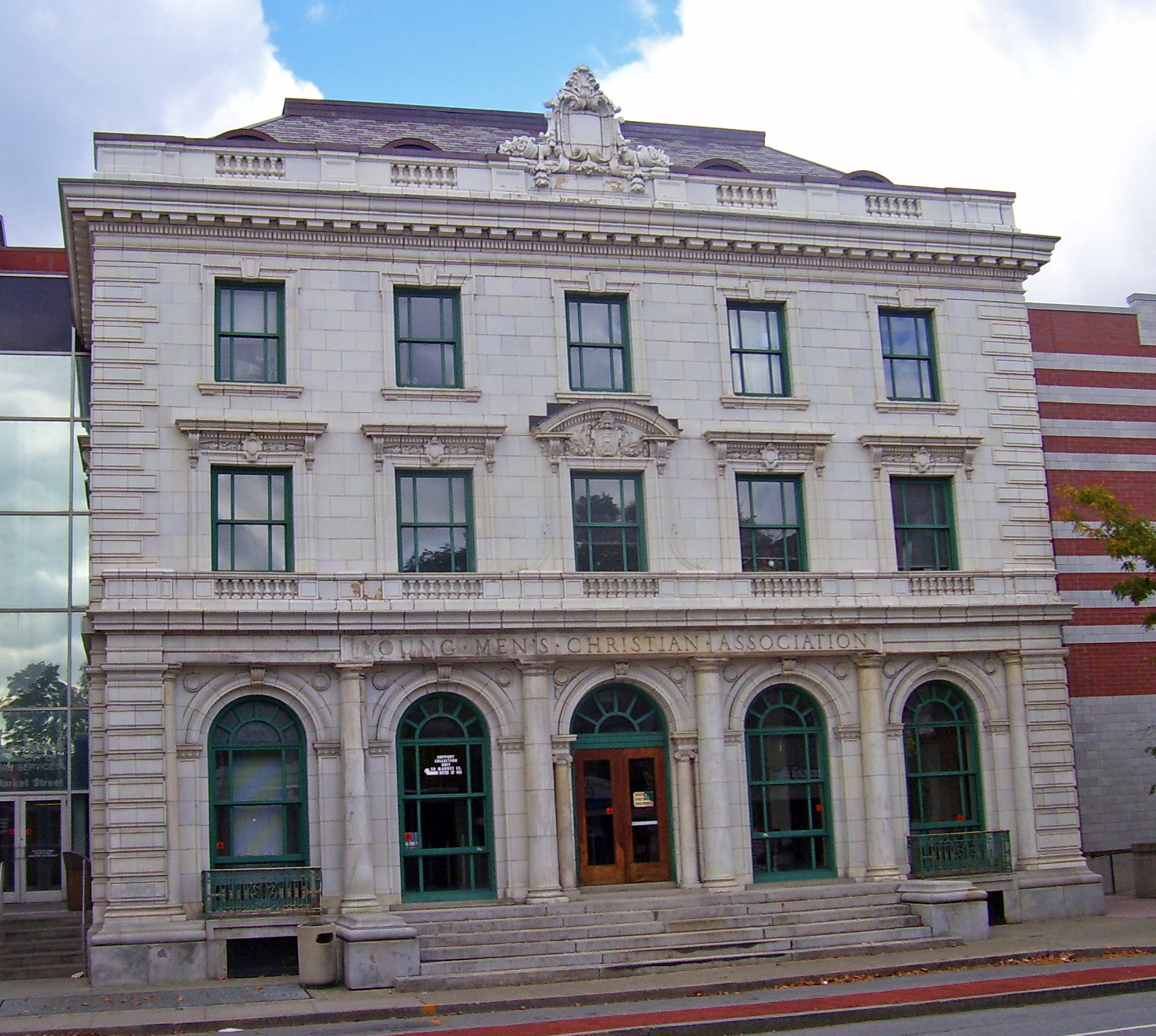 YMCA in Poughkeepsie, NY, USA